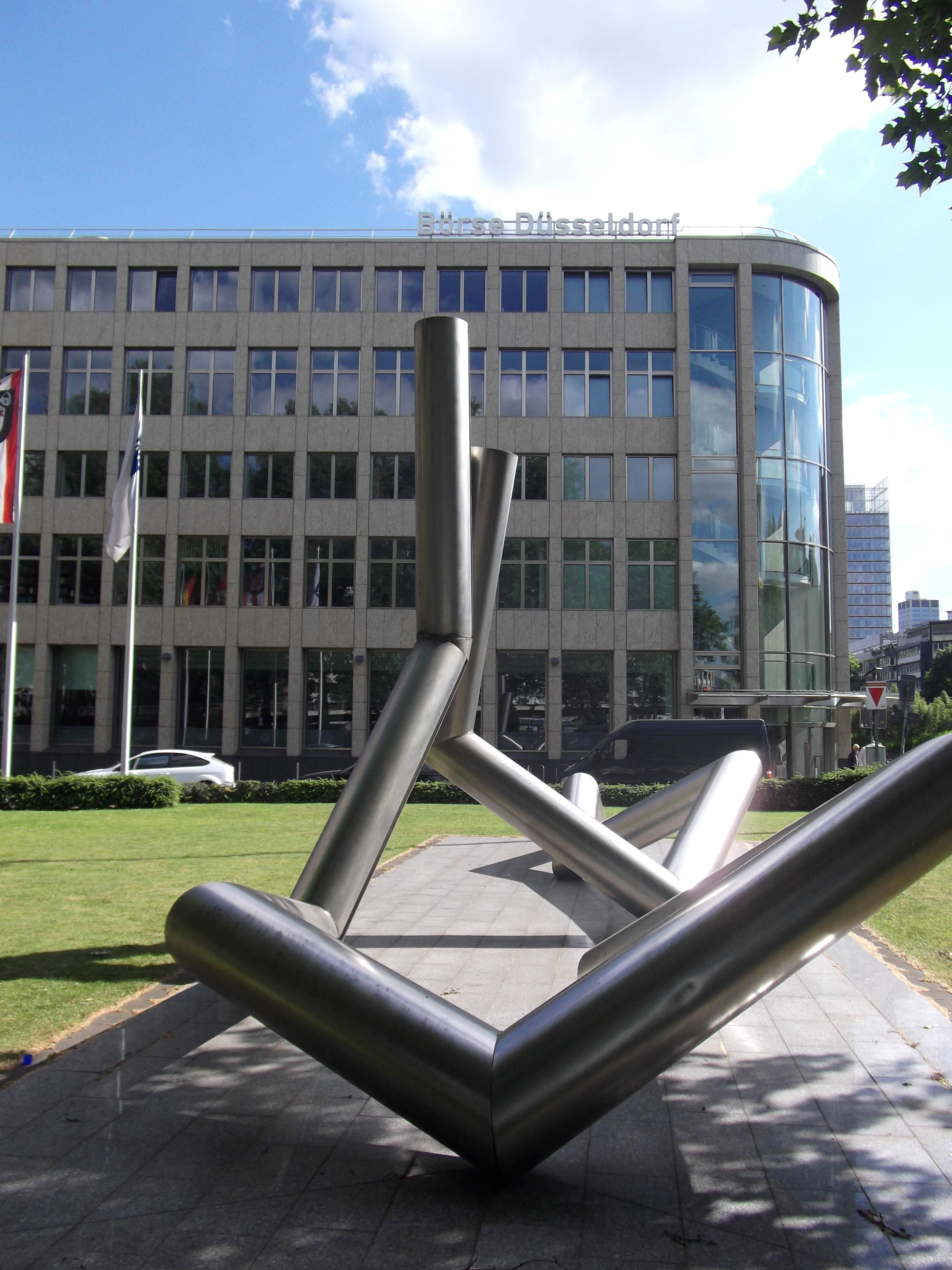 Düsseldorf, Germany: Ernst-Scheider-Platz: IHK und Börse Düsseldorf mit Stahl-Skulptur von Erich Hauser (1931-2004)